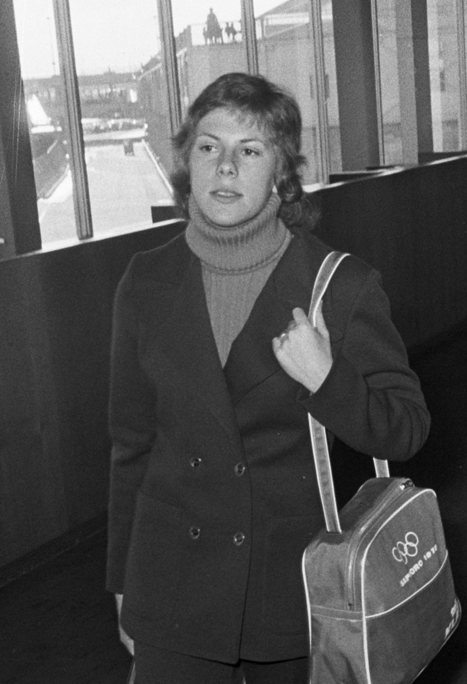 Sippie Tigchelaar